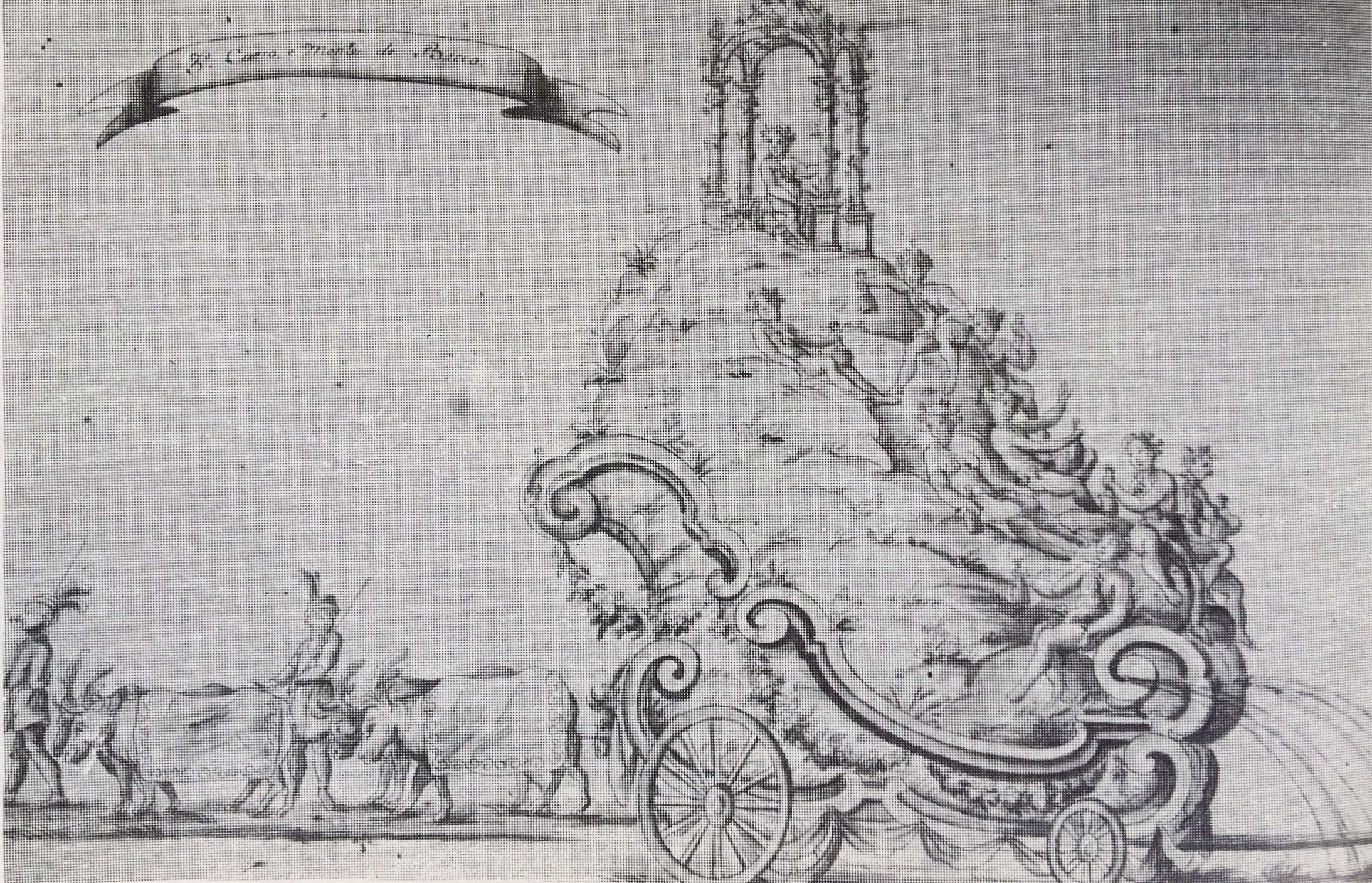 Desenho por Antônio Francisco Soares do carro alegórico "de Baco" de Soares de 1786 para as festividades locais comemorativas do casamento dos Infantes de Portugal.